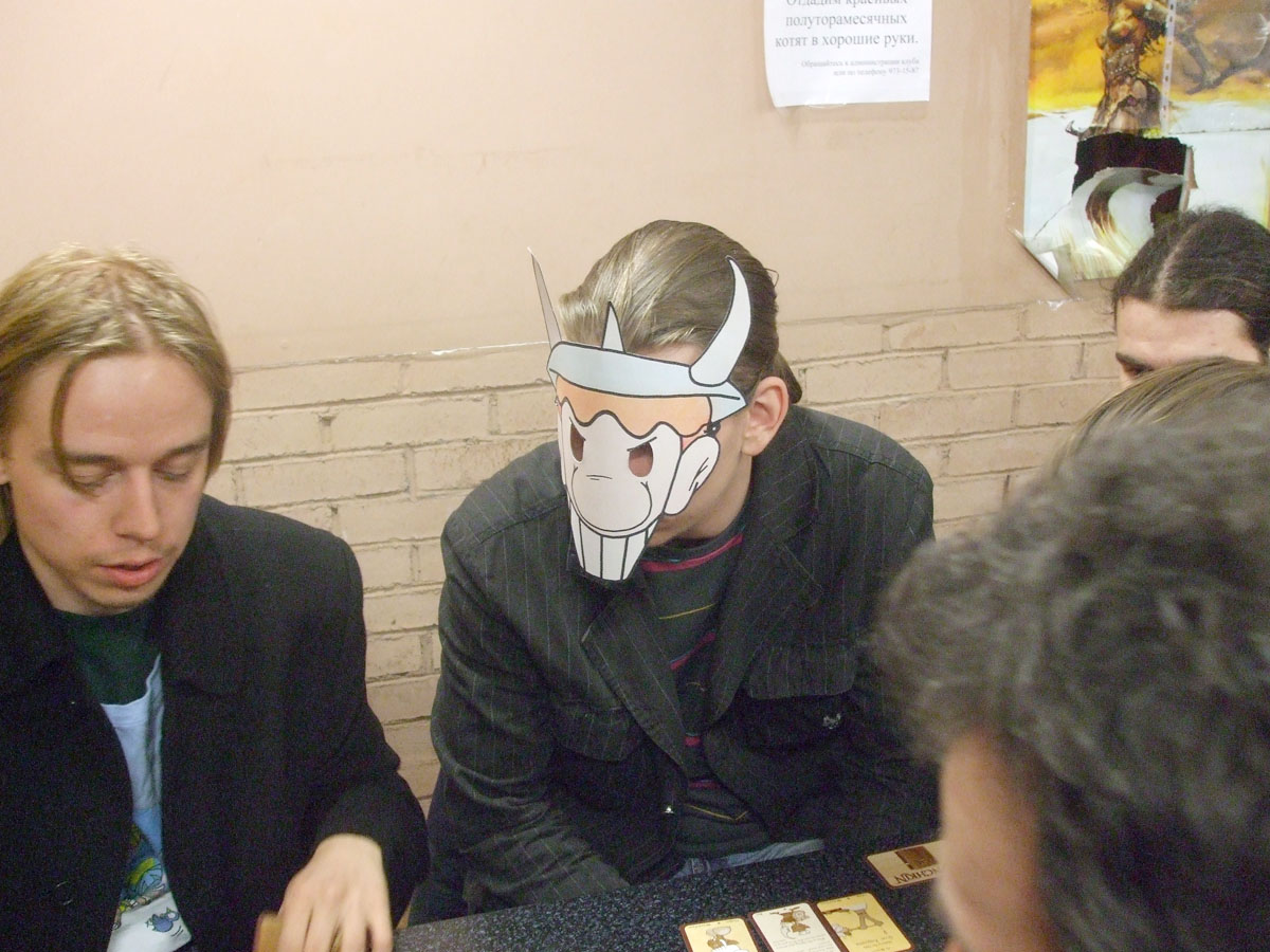 Manchkin Mask